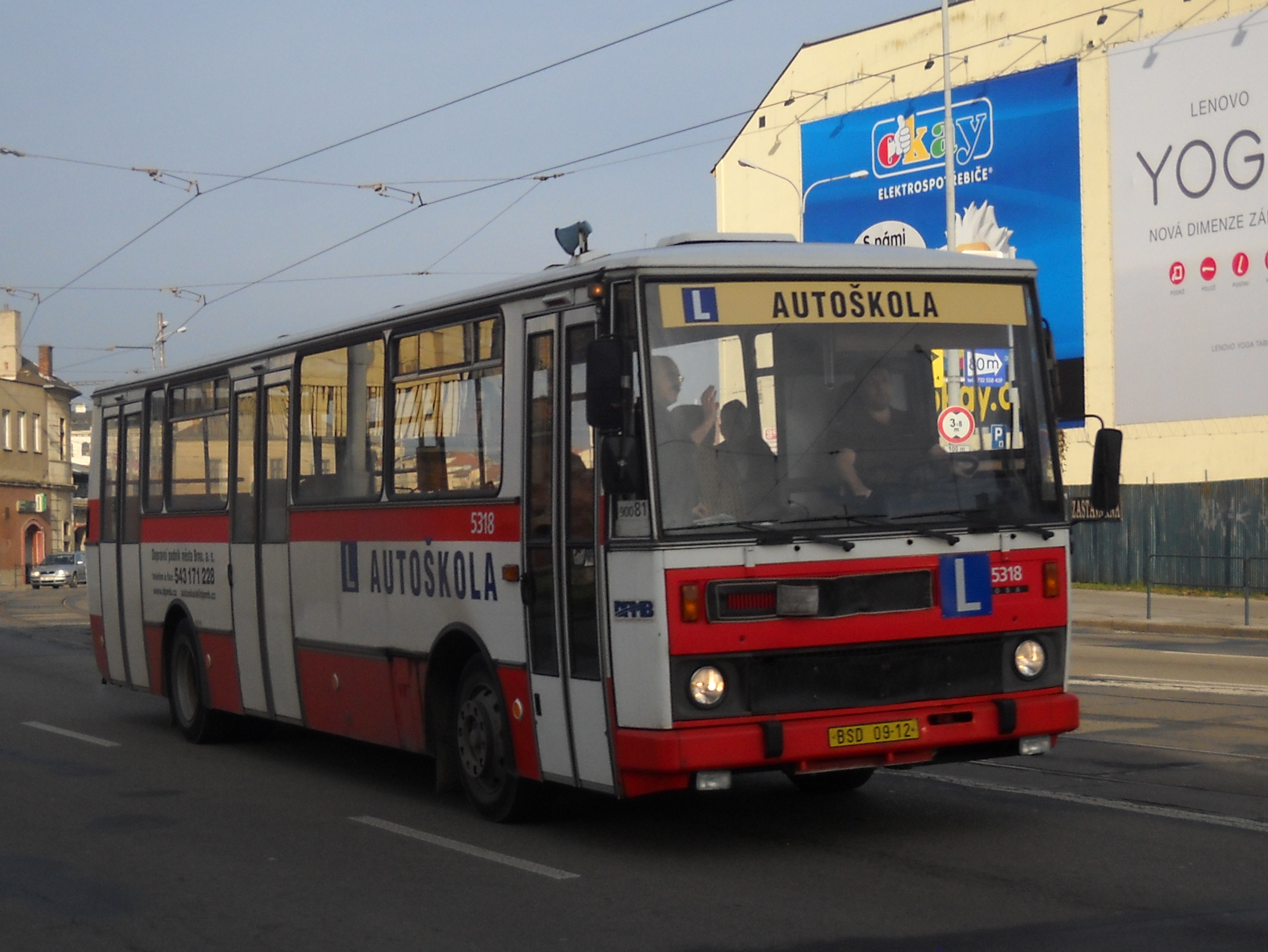 Karosa B732 autoškoly Brněnského DP